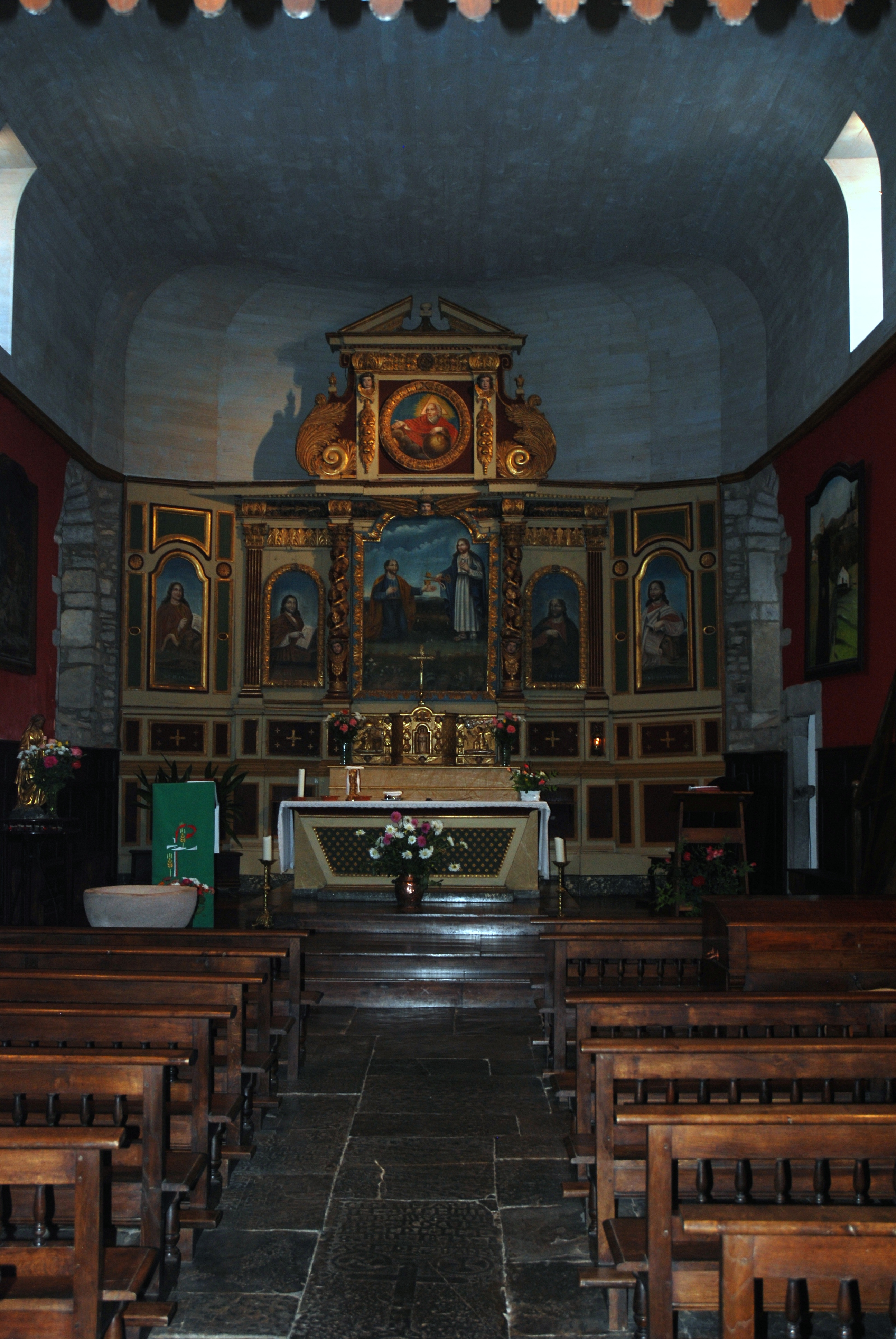 L'église Saint-Pierre à Juxue